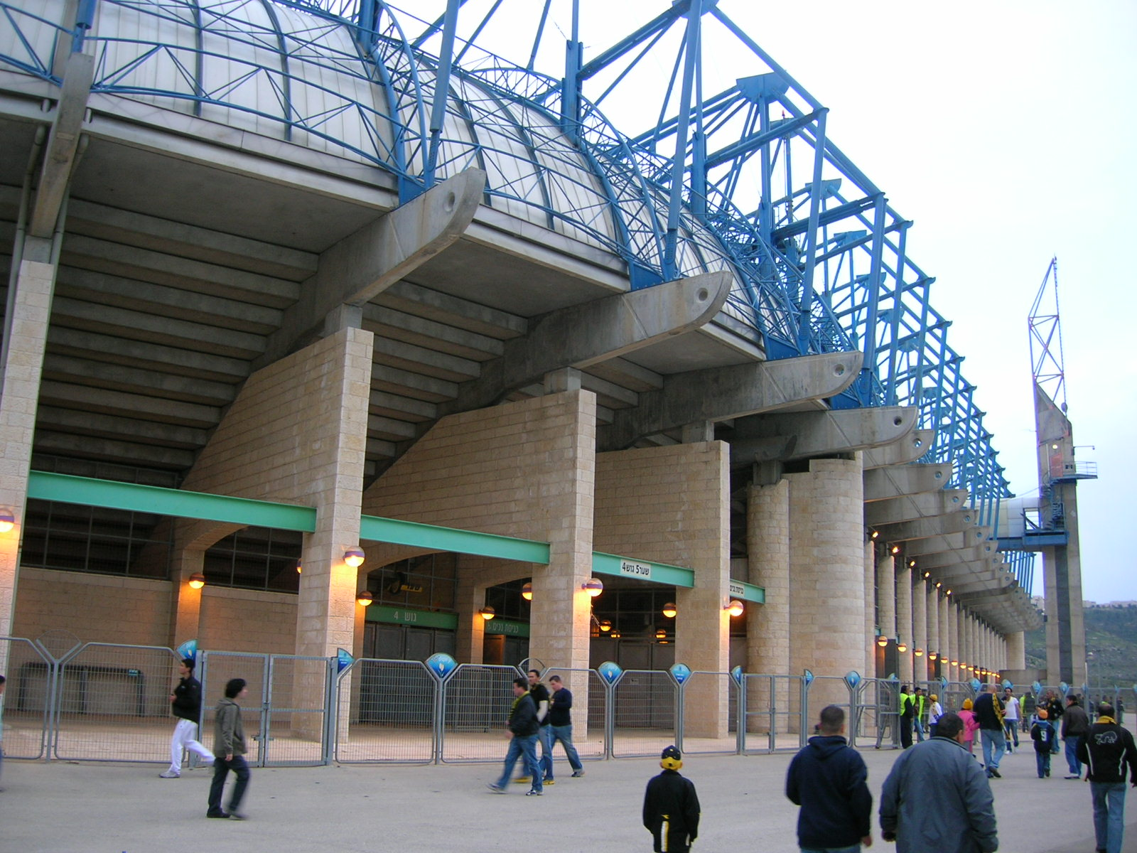 Teddy Kollek Stadium, Jerusalem, Israel